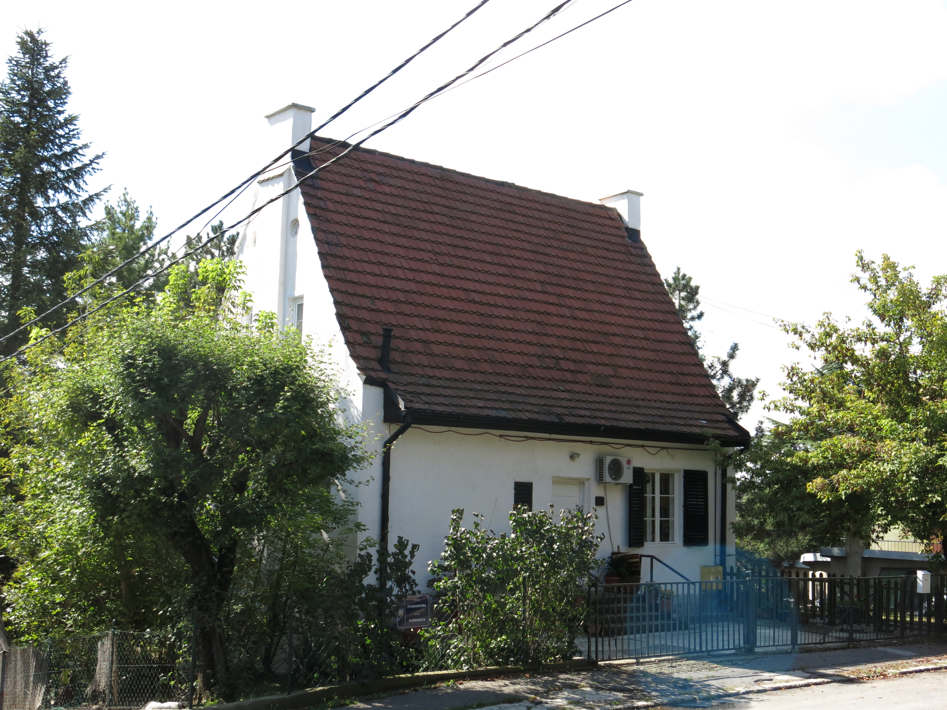 Кућа породице Поповић-Предић